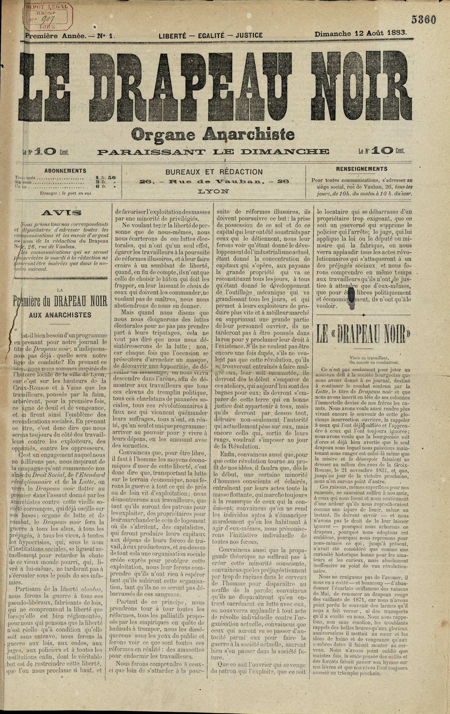 Le Drapeau Noir, organe anarchiste : 17 numéros publiés entre août et décembre 1883.